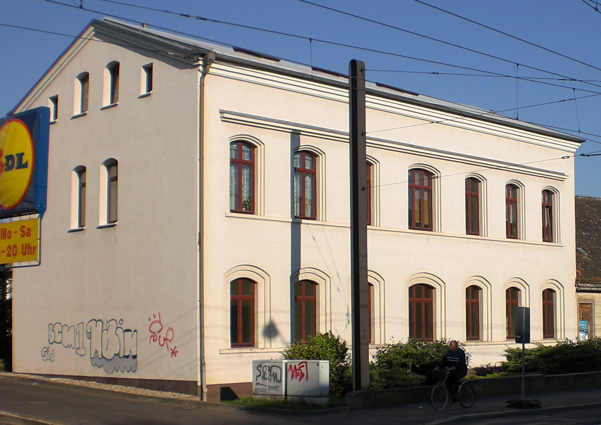 Alt Salbke 49, ehemalige Direktorenvilla von Fahlberg-List, nach Sanierung im Jahr 2008 von der Kanada-Bau GmbH Braunschweig abgerissen, um eine bessere Sichtbarkeit für einen dahinter geplanten Einkaufsmarkt zu erreichen